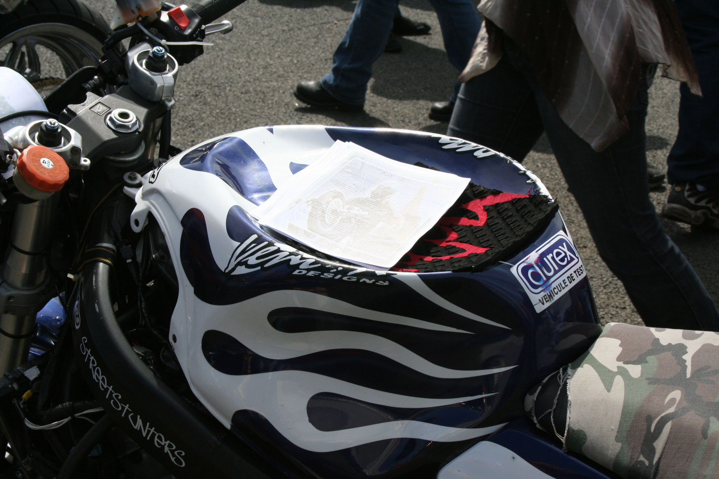 Réservoir aplati servant à la pratique du stunt.